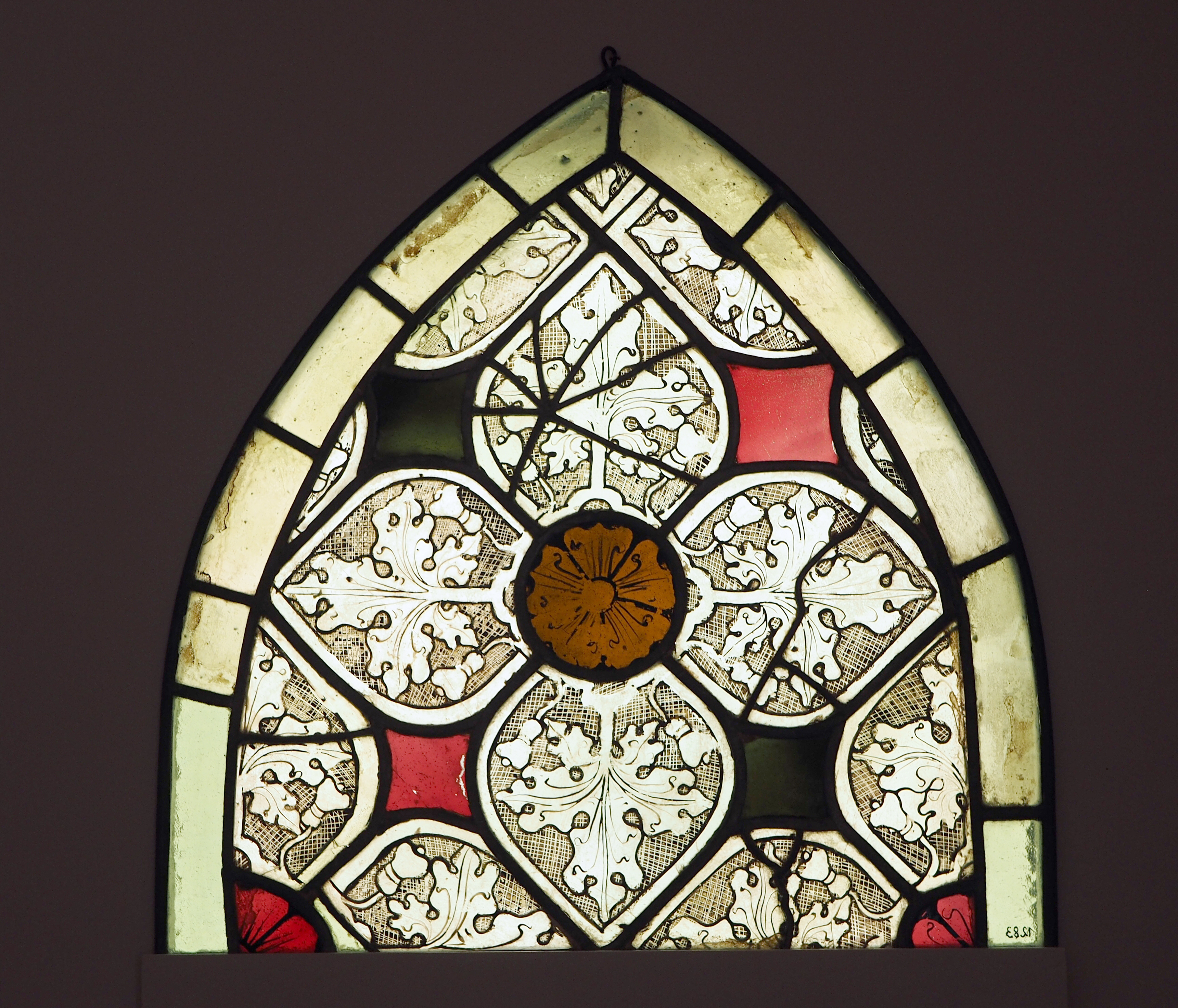 Ornamentscheibe aus dem Kloster zum Heiligen Kreuz Rostock, 2. Viertel 14. Jh., Glas/Schwarzlotmalerei